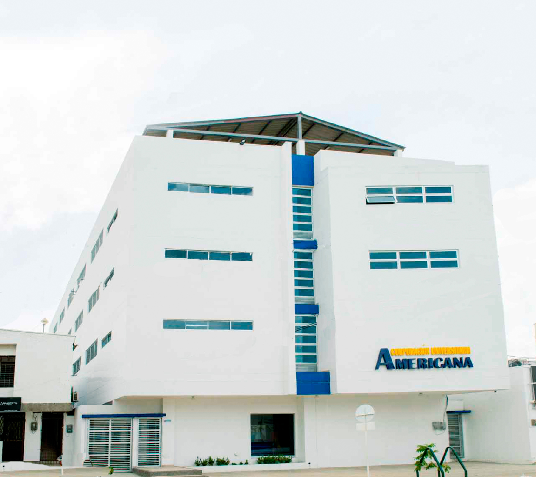 Sede Montería Americana